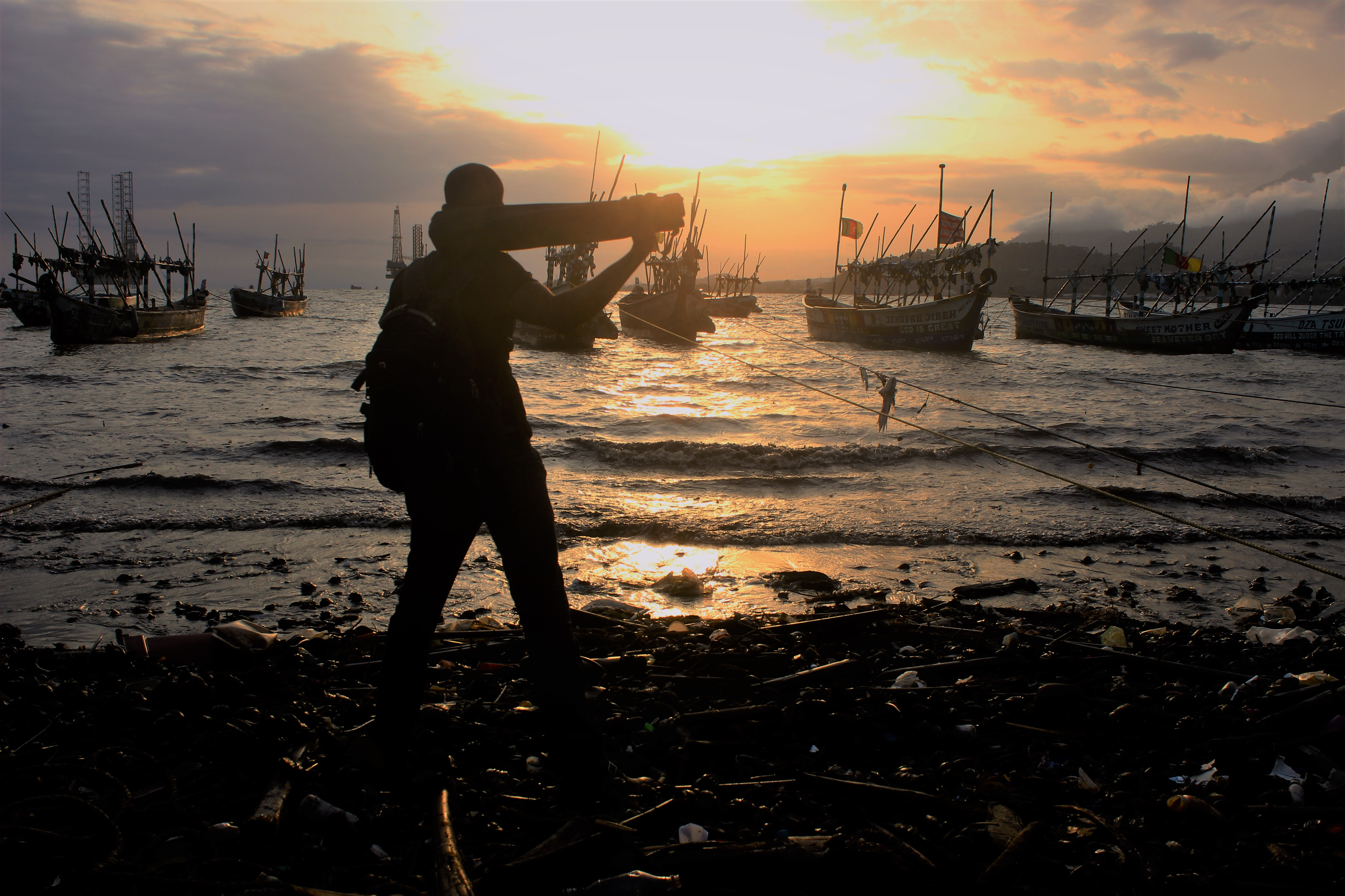 Sur cette photo deux réalités, la terre et la mer la création du jeune trouve un obstacle faut il prendre la voie par la nage immigrer pour poursuivre son rêve?